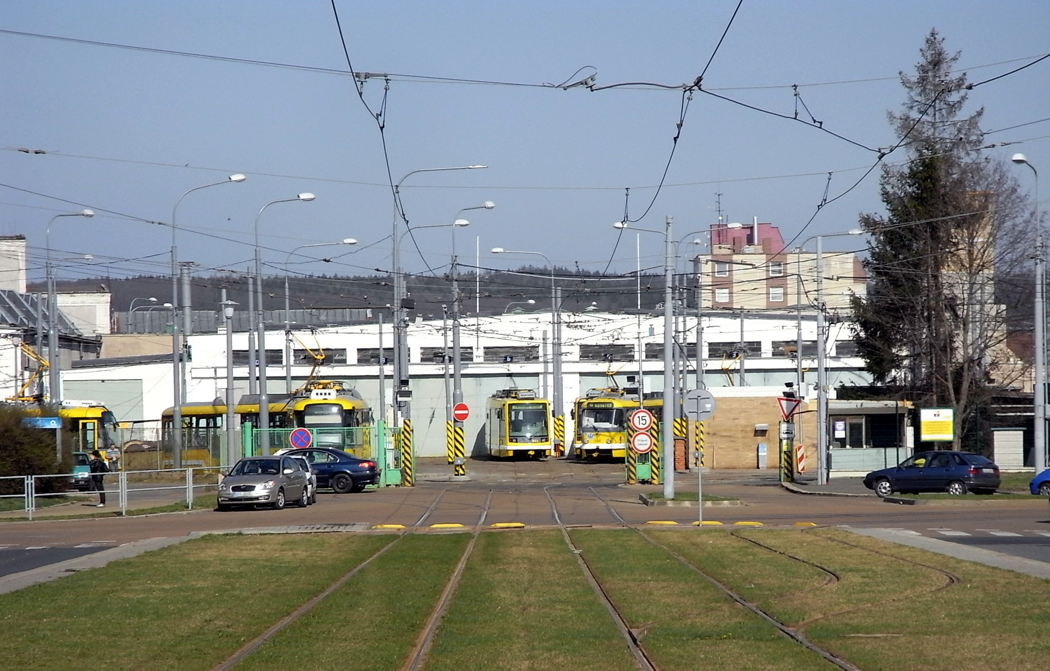 Straßenbahndepot Slovany in Pilsen.